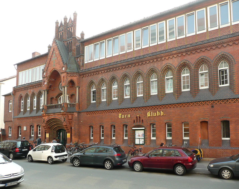 Turnhalle Turnklubb Hannover